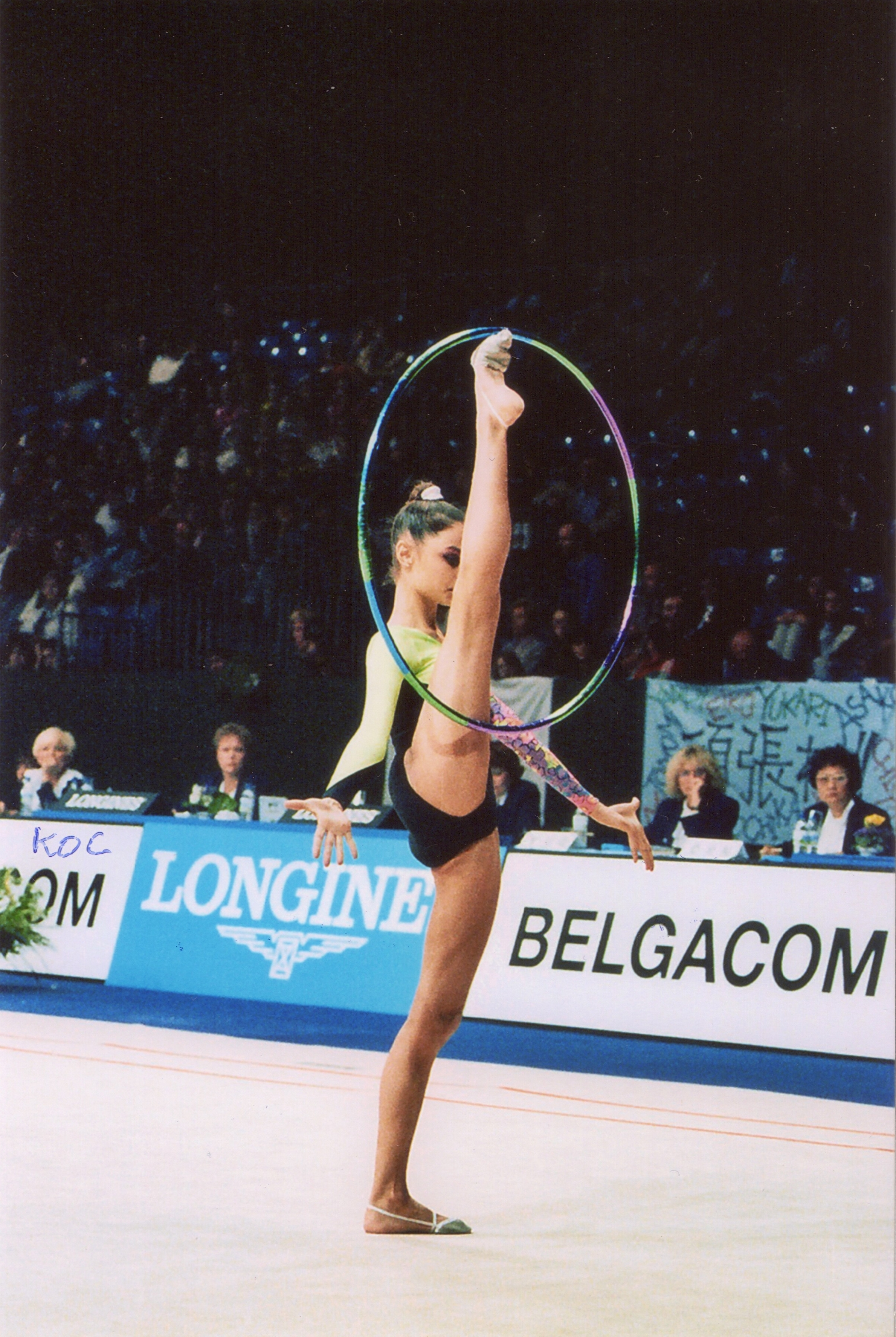 La gimnasta española Amaya Cardeñoso en el Campeonato Mundial de Bruselas en 1992.